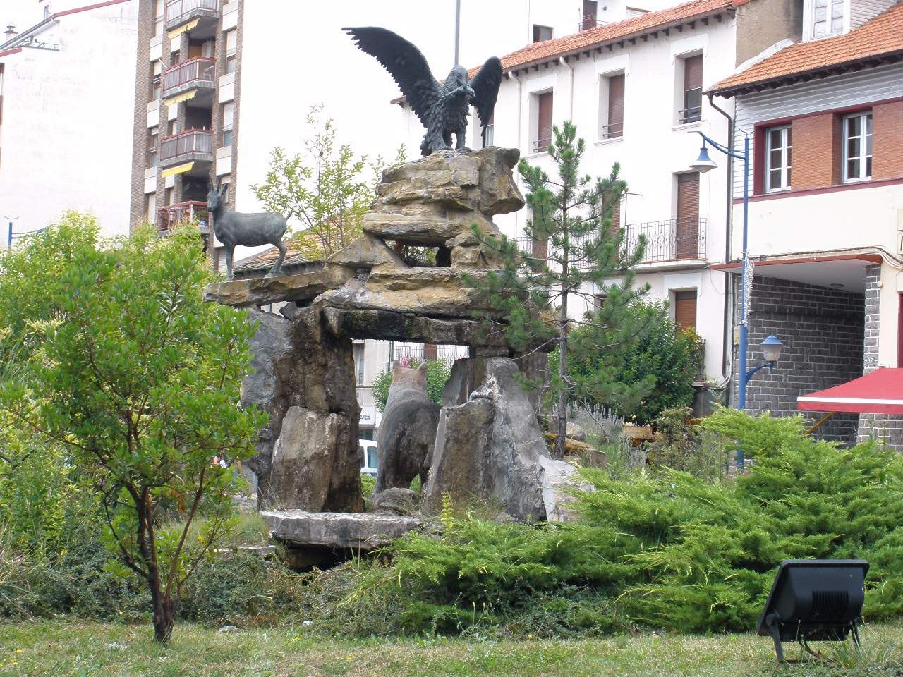 Sabiñanigo - Plaza de España